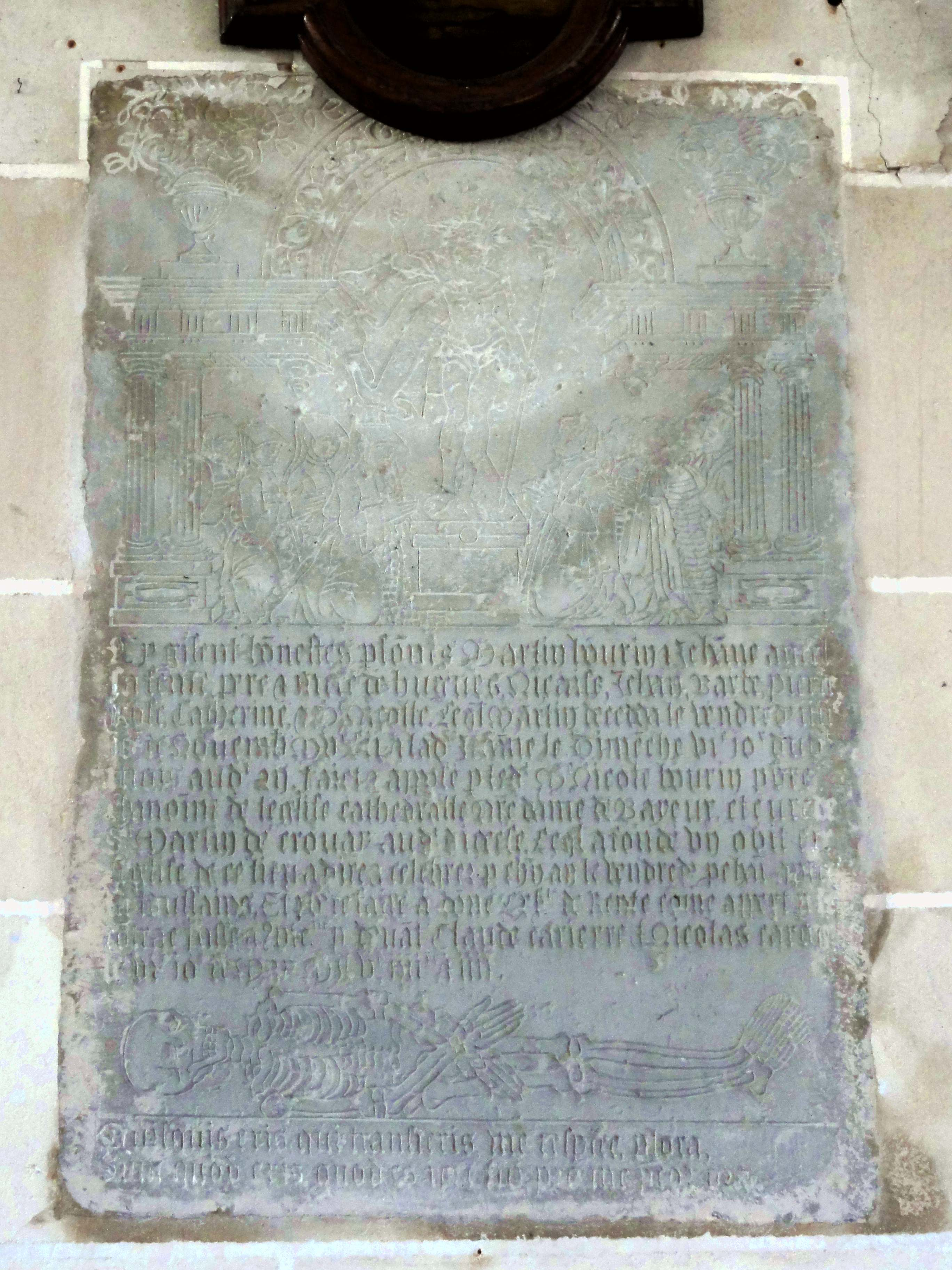 Plaque de fondation de Martin Bourin et Jeanne Ancel, 1594.